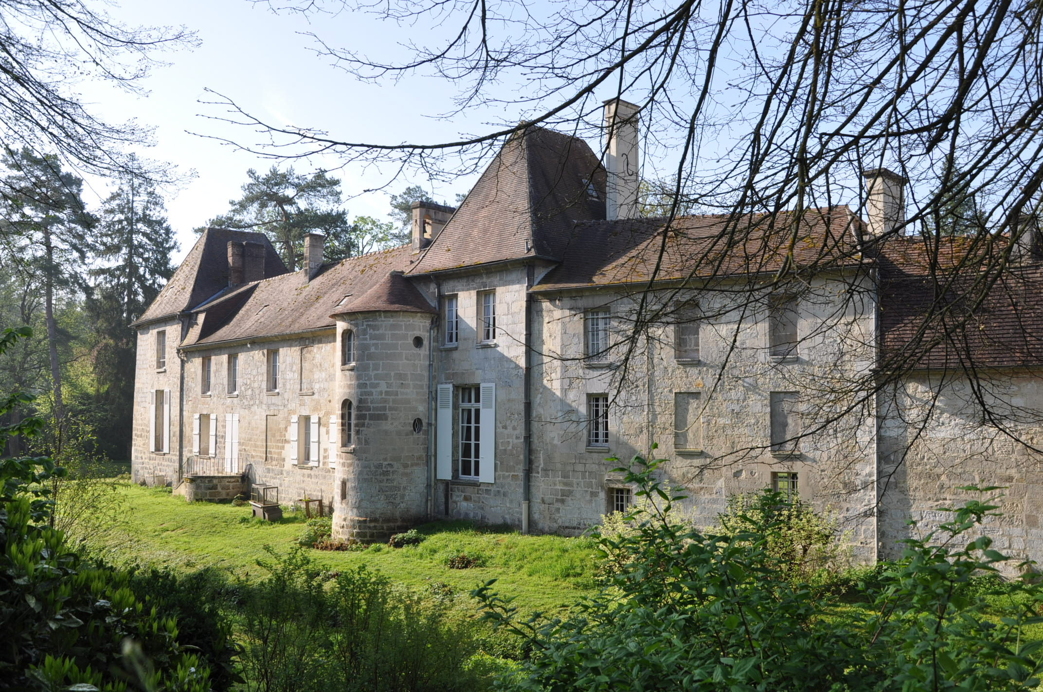 Château de Cuise, Cuise-La-Motte (Oise / Soissonnais)